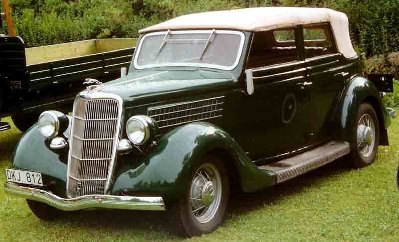 Ford Model 48 740 Convertible Sedan 1935